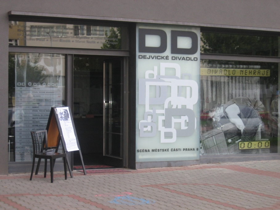 Fotografie Dejvického divadla